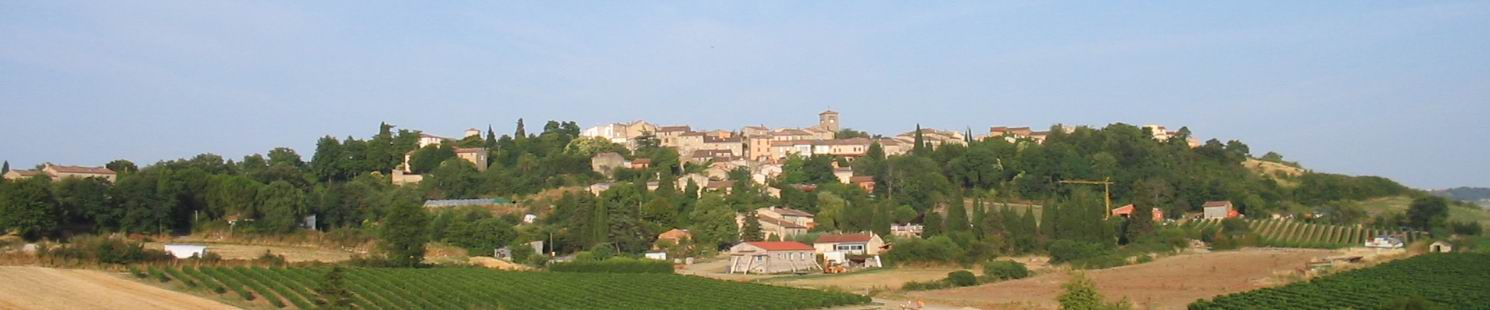 Vue panoramique de Bellegarde-du-Razès coté Est.